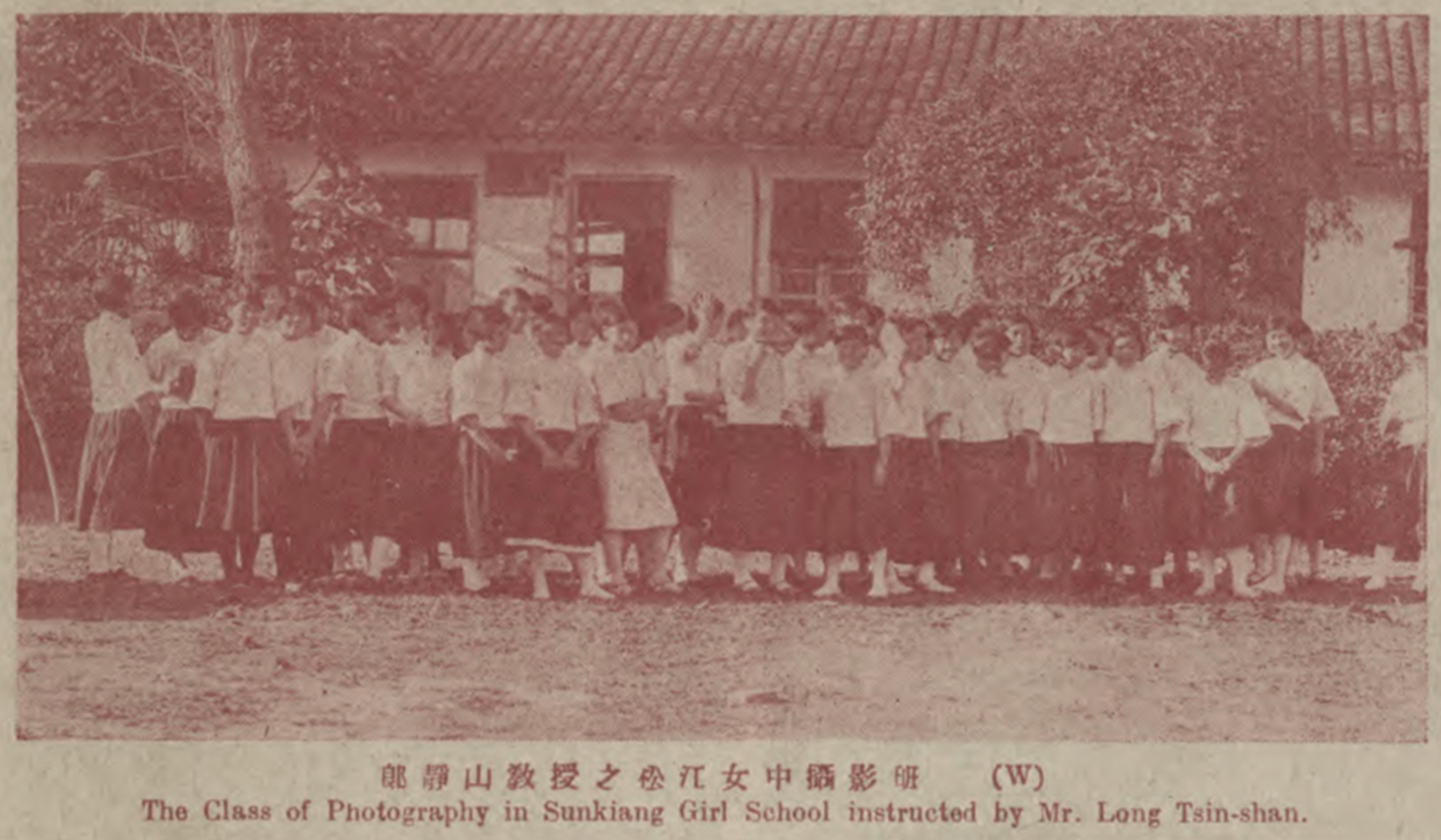 中文（台灣）: 《圖畫時報》 1929 年 [ 第602期 ，2頁 ]